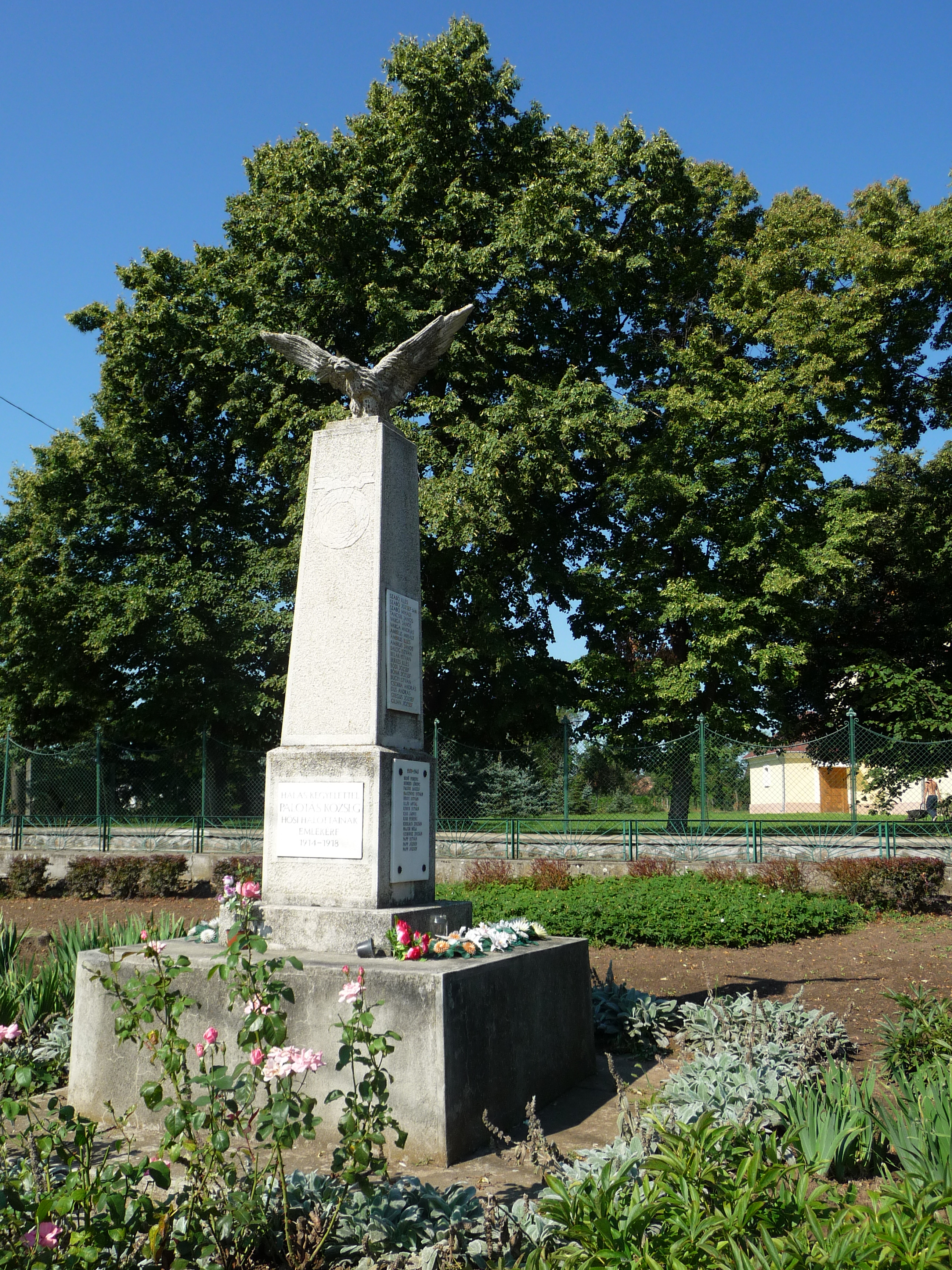 I. világháborús hősi emlékmű (Palotás)